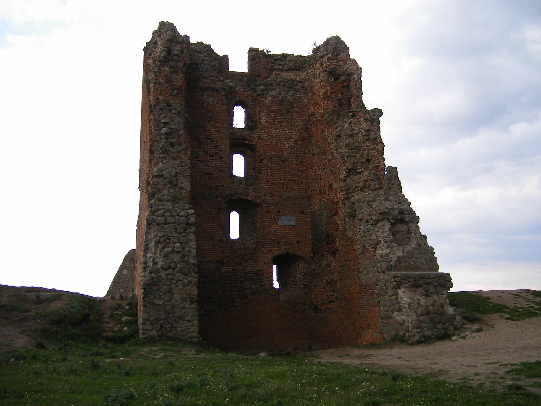 Navahrudak, Castle